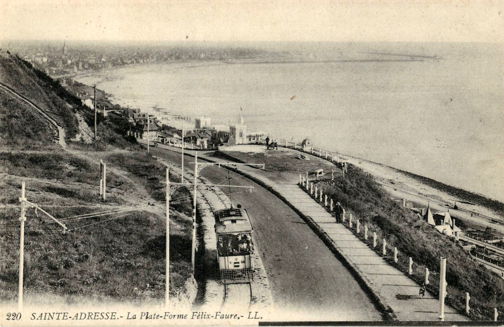 Carte postale ancienne éditée par LL, n°220 : SAINTE-ADRESSE - La Plate-Forme Félix-Faure